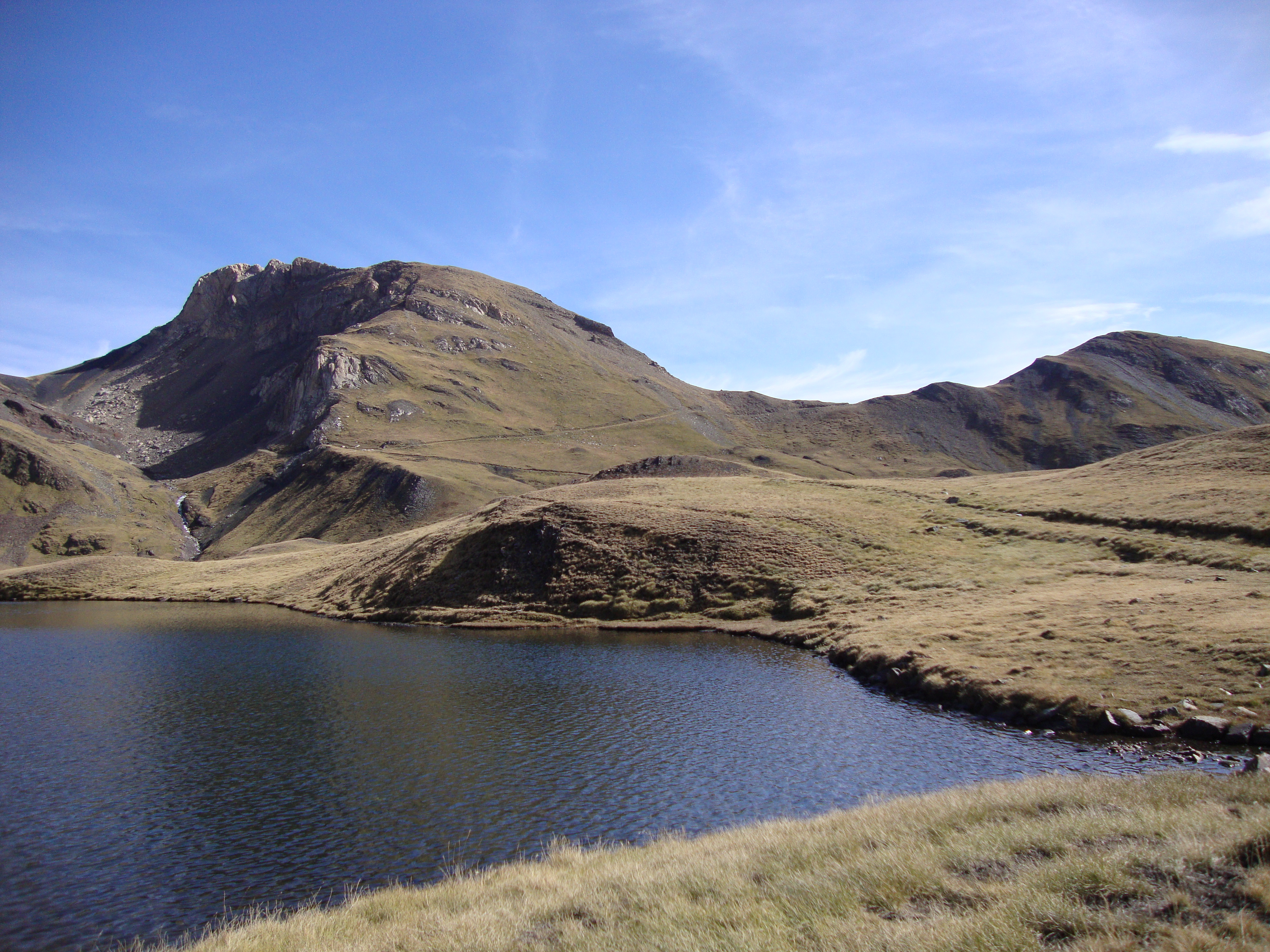 Tuc de Montoliu e Lac de Montoliu